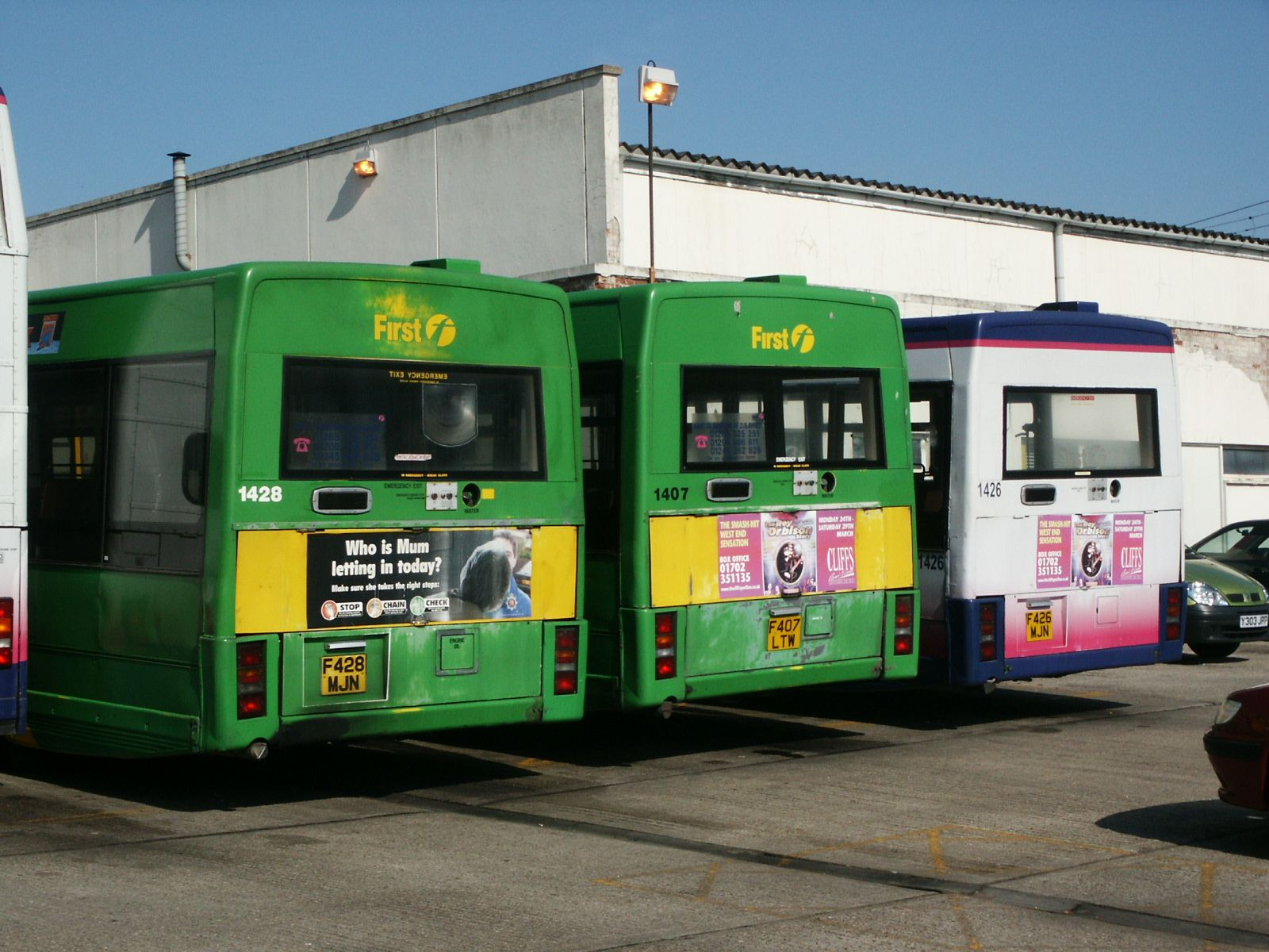 F428MJN F407LTW F426MJN 300303 CPS